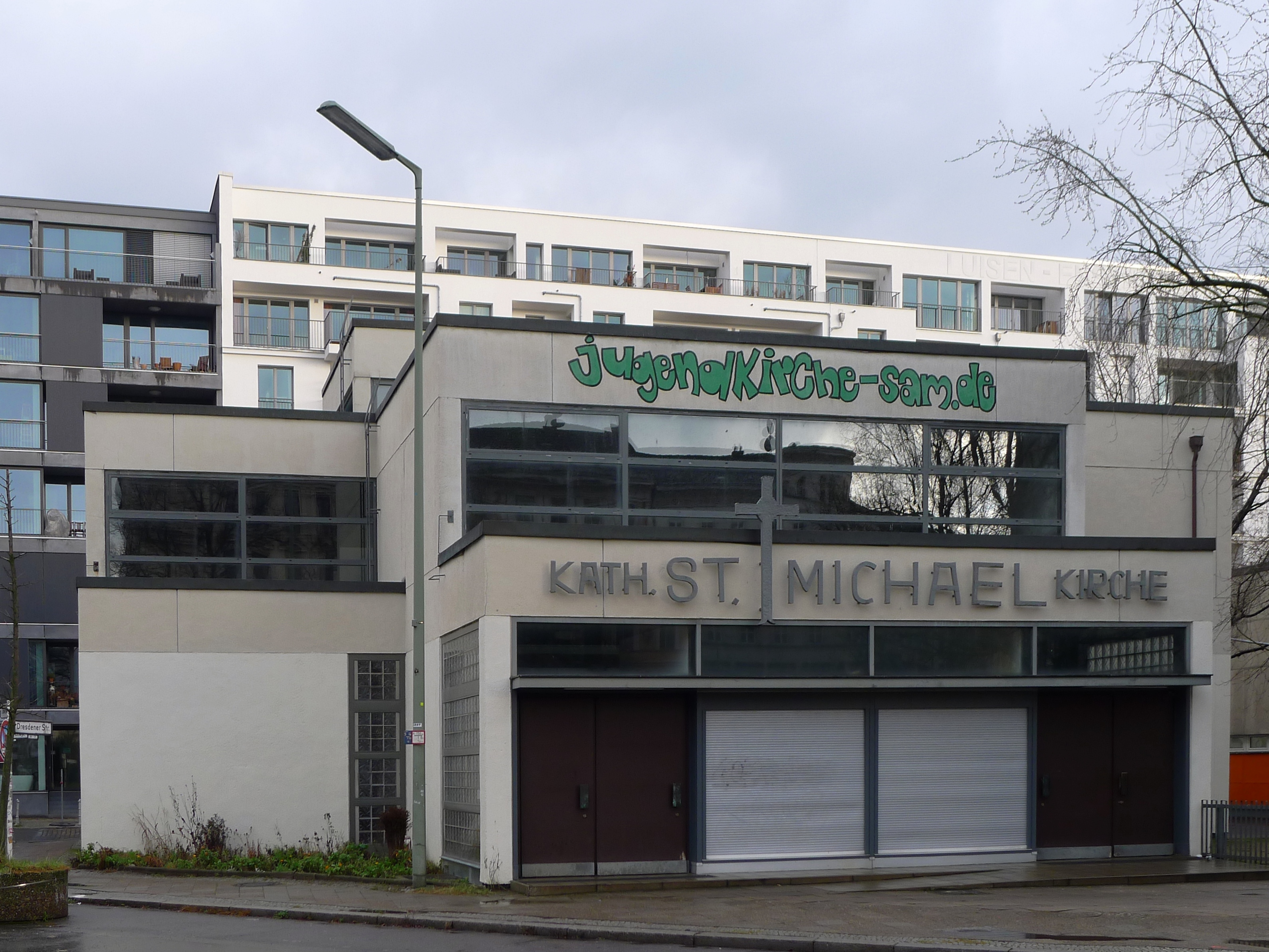 Blick auf das Portal der Kirche